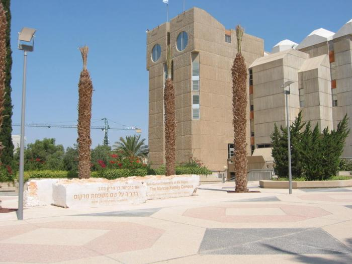 הבניין הראשון שנבנה בקמפוס החדש של אוניברסיטת בן-גוריון בראשית שנות השבעים. אז שכנו בו הספרייה והפקולטה למדעי הרוח.